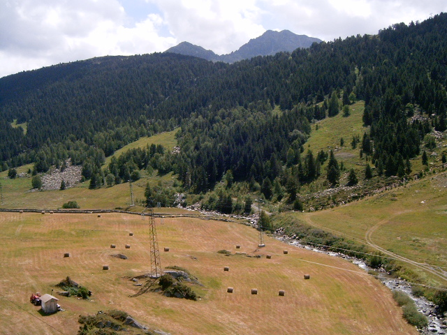 Andorra